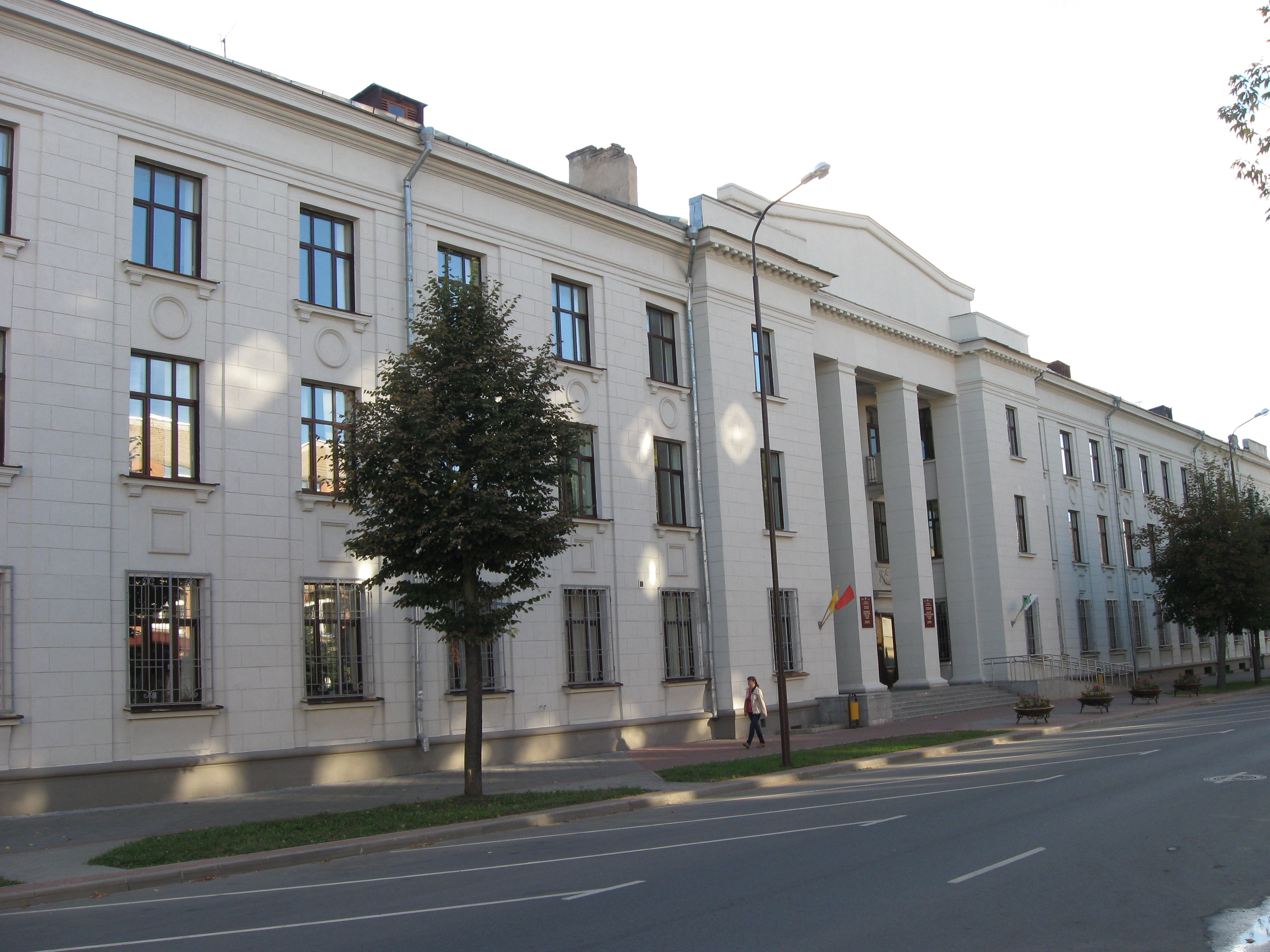 Беларуская (тарашкевіца): Будынак каледжа сувязі. г. Менск This is a photo of Belarusian heritage monument. Reference number: 713Г000016 ( WLM)